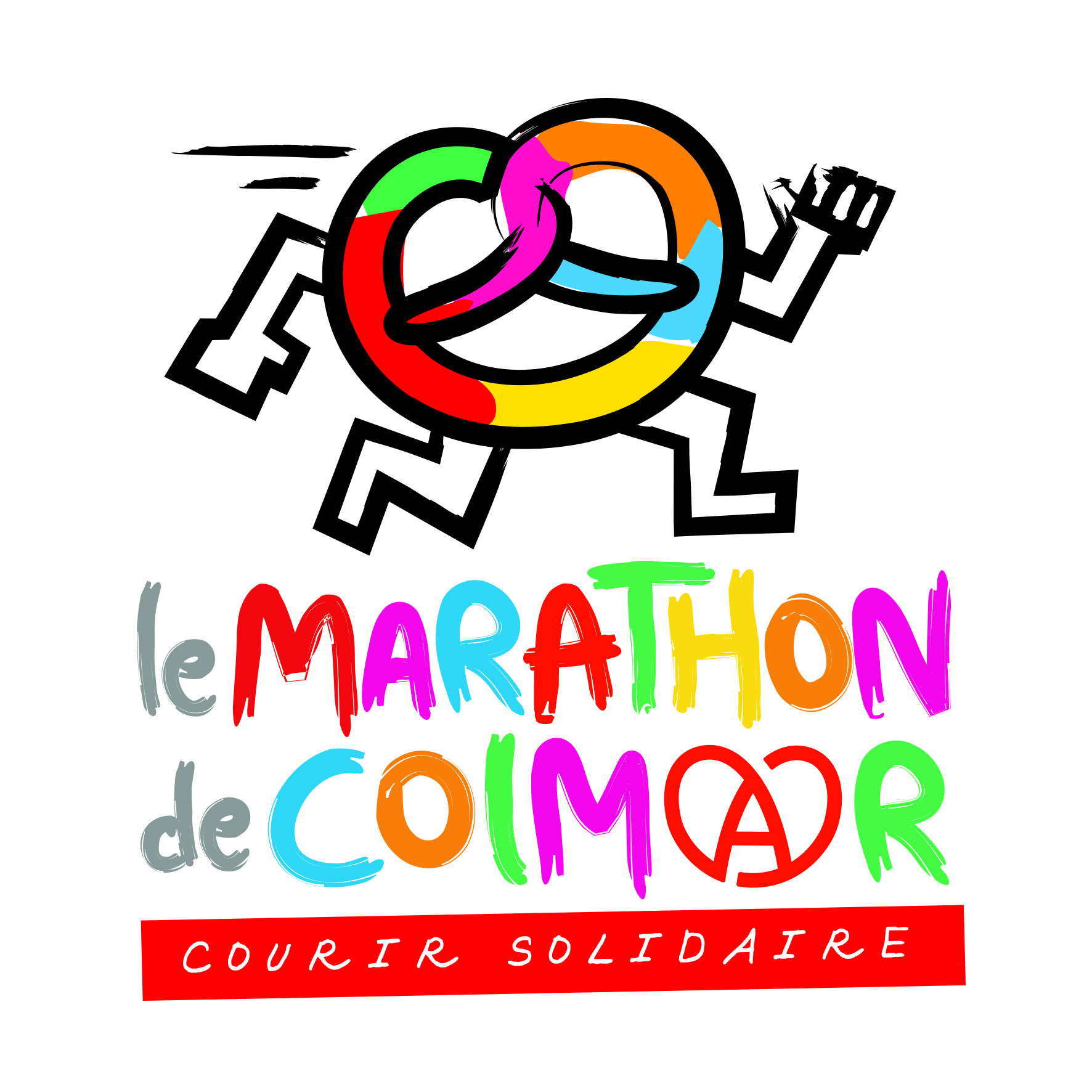 Le bretzel Runner est l'emblème du Marathon de Colmar depuis 2015.